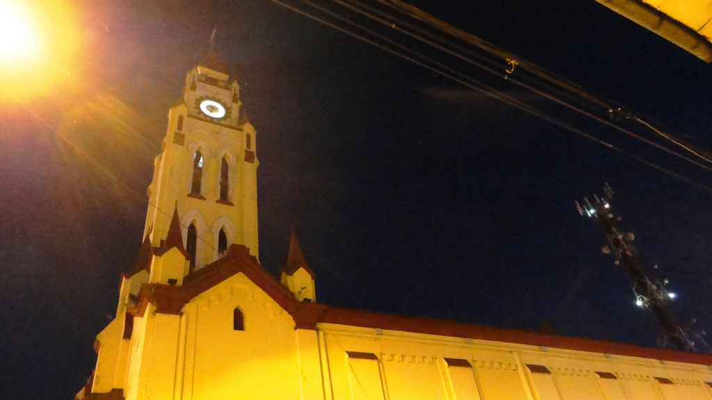 Lado oeste de la Iglesia Matriz de Iquitos.